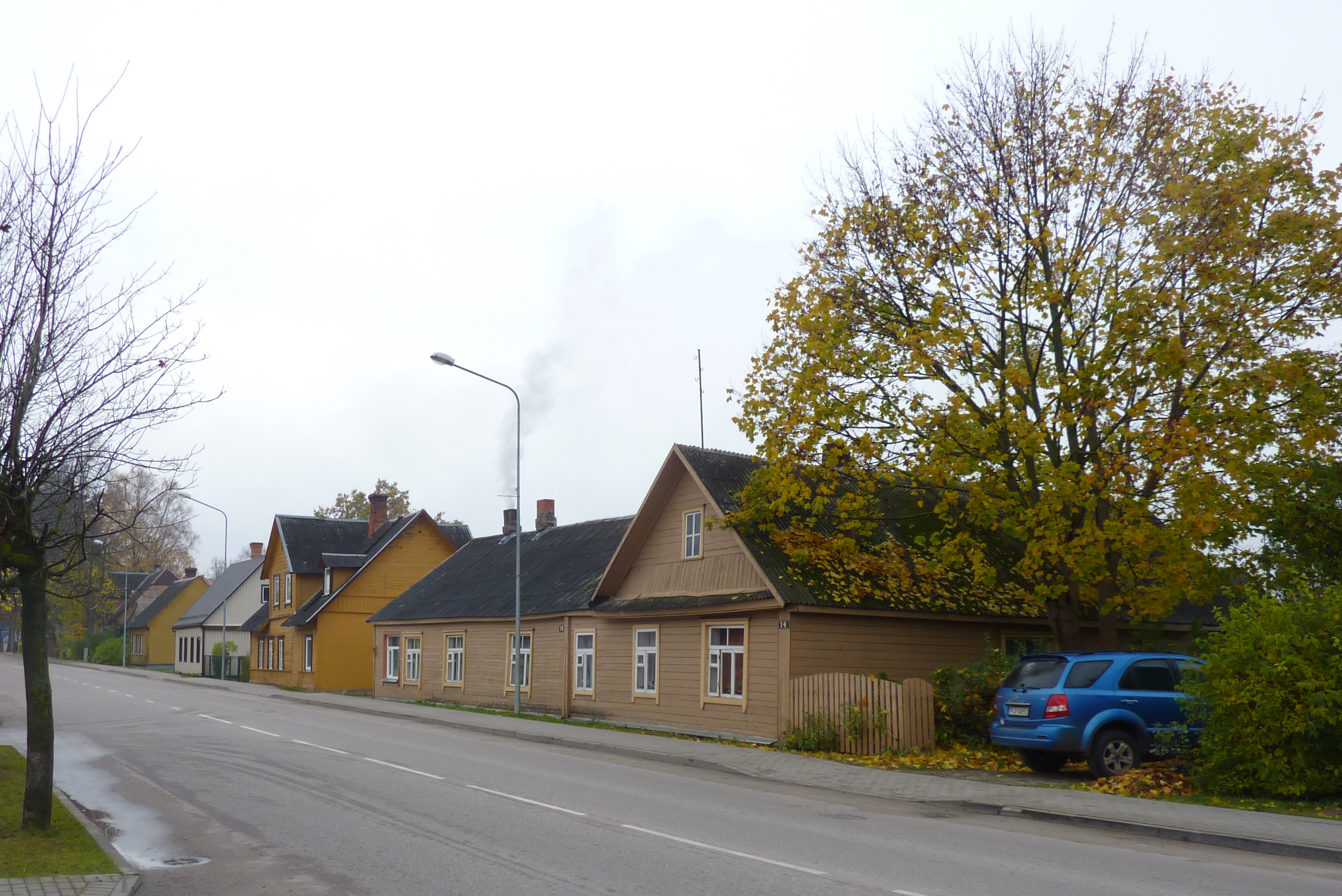 Preiļi, typowa zabudowa (Daugavpils iela)